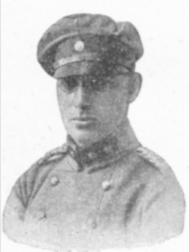 Description